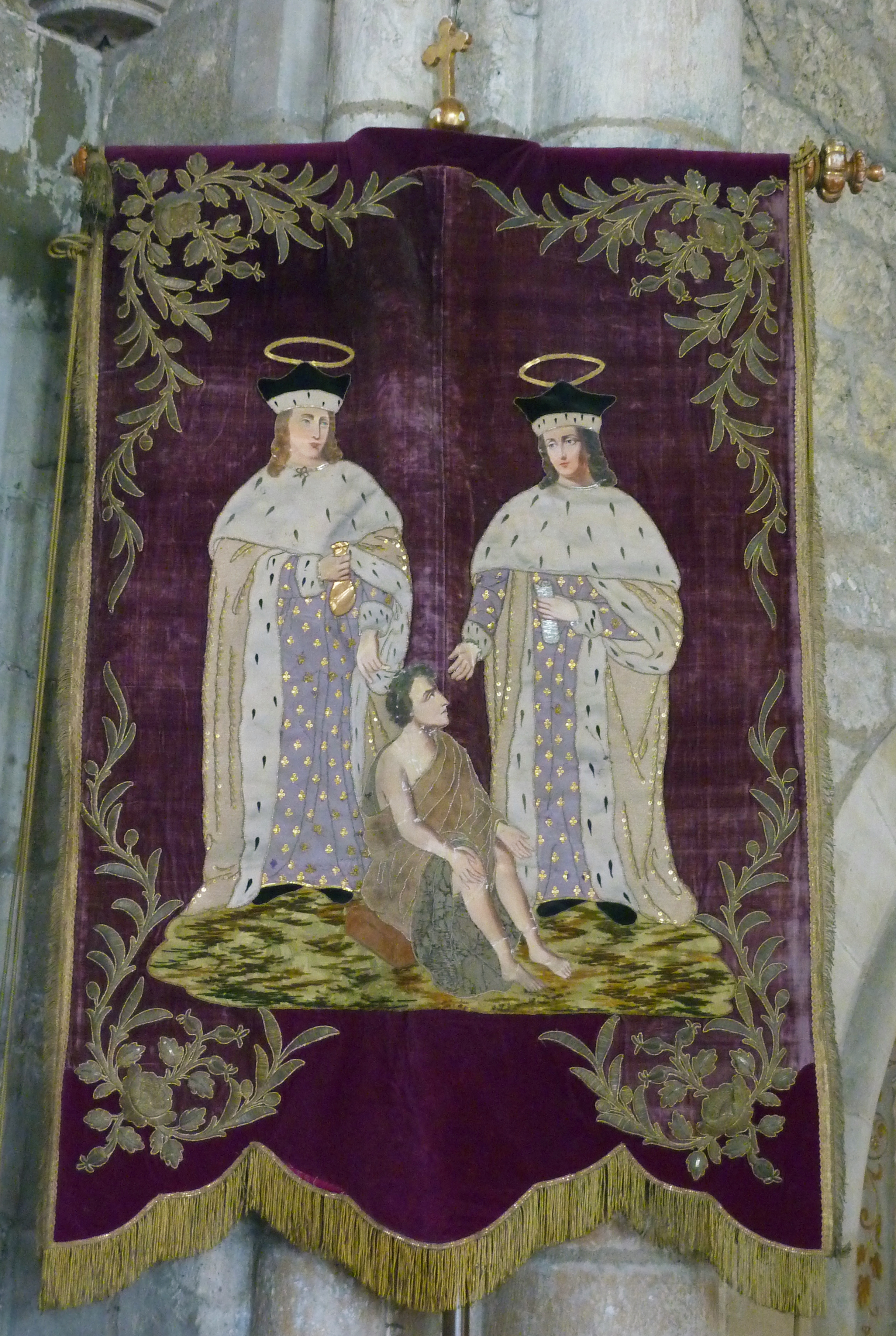 Katholische Kirche Saint-Côme-et-Saint-Damien in Luzarches, einer Gemeinde im Département Val-d'Oise (Île-de-France), Prozessionsfahne mit Darstellung der Heiligen Cosmas und Damian